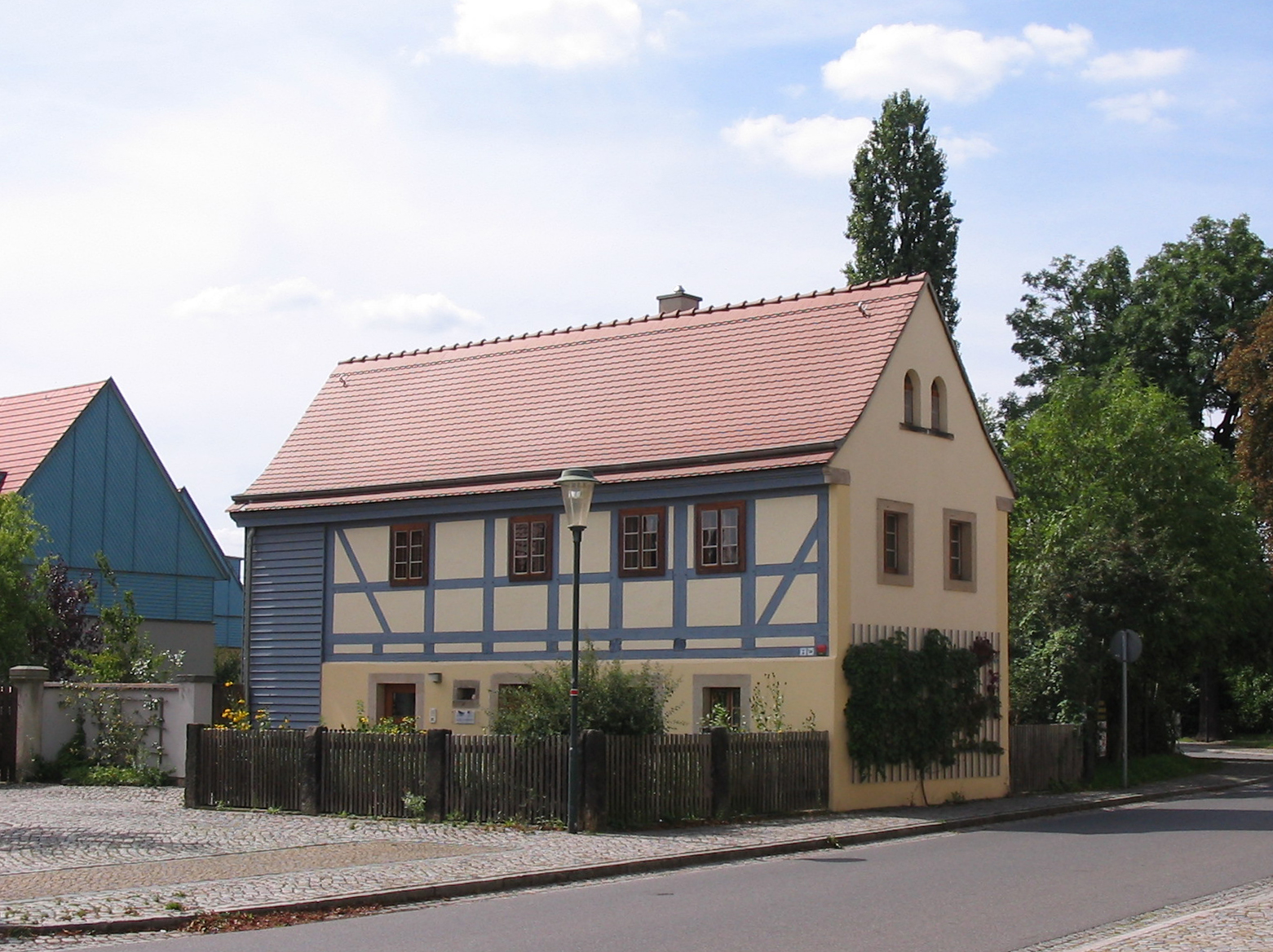 Hirtenhaus